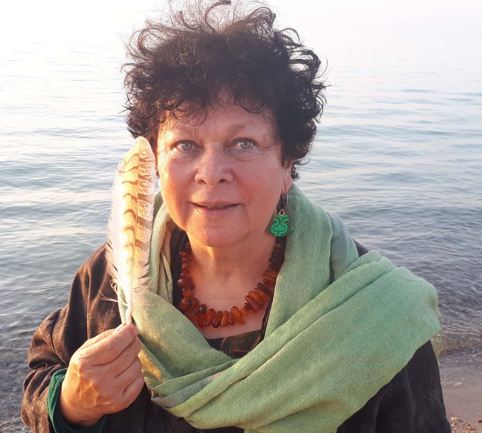 Nana Nauwald 2019 in Issyk Kul (Kirgisistan)